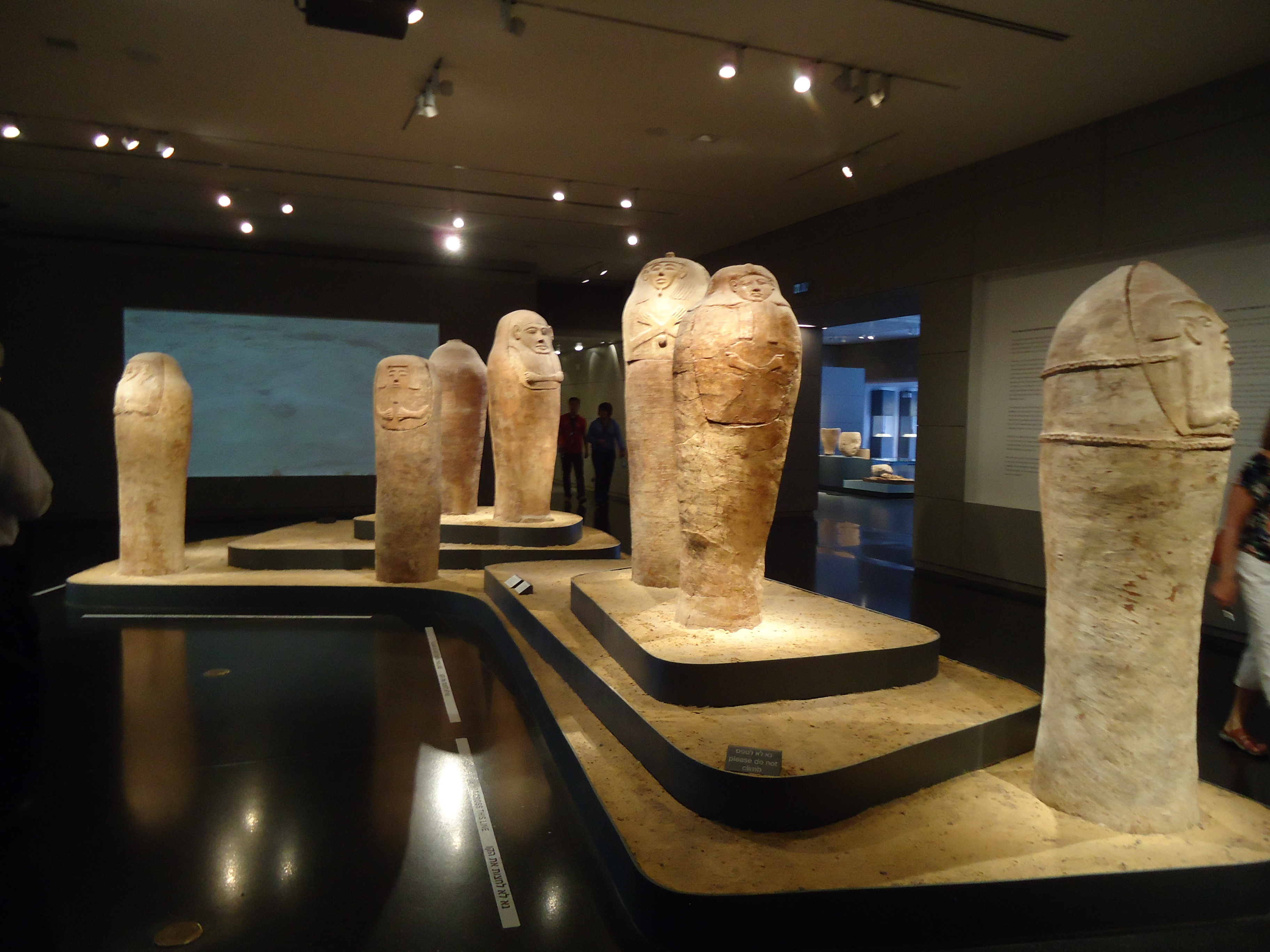 סרקופגים אנתרופואידים, מדיר אל-בלח, המאה הארבע עשרה - המאה השלוש עשרה לפני הספירה. צולם במוזיאון ישראל